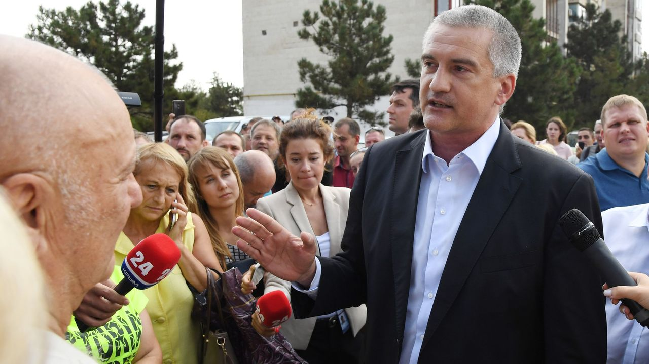 Глава Республики Крым Сергей Аксёнов выехал в город Армянск, где пообщался с местными жителями по поводу ситуации с ликвидацией последствий выбросов в городе.